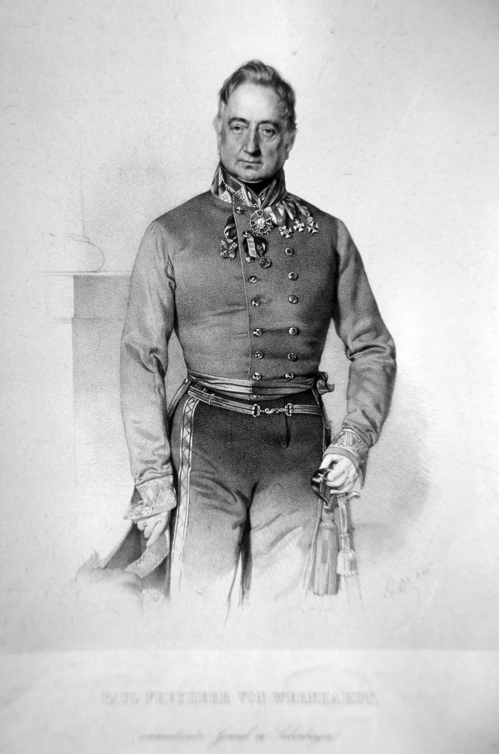 Paul Freiherr von Wernhardt (1776-1846), General der Kavallerie. Lithographie von Franz Eybl, 1840